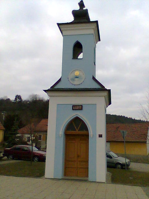 kaple sv. Gotharda v Mokré-Horákově